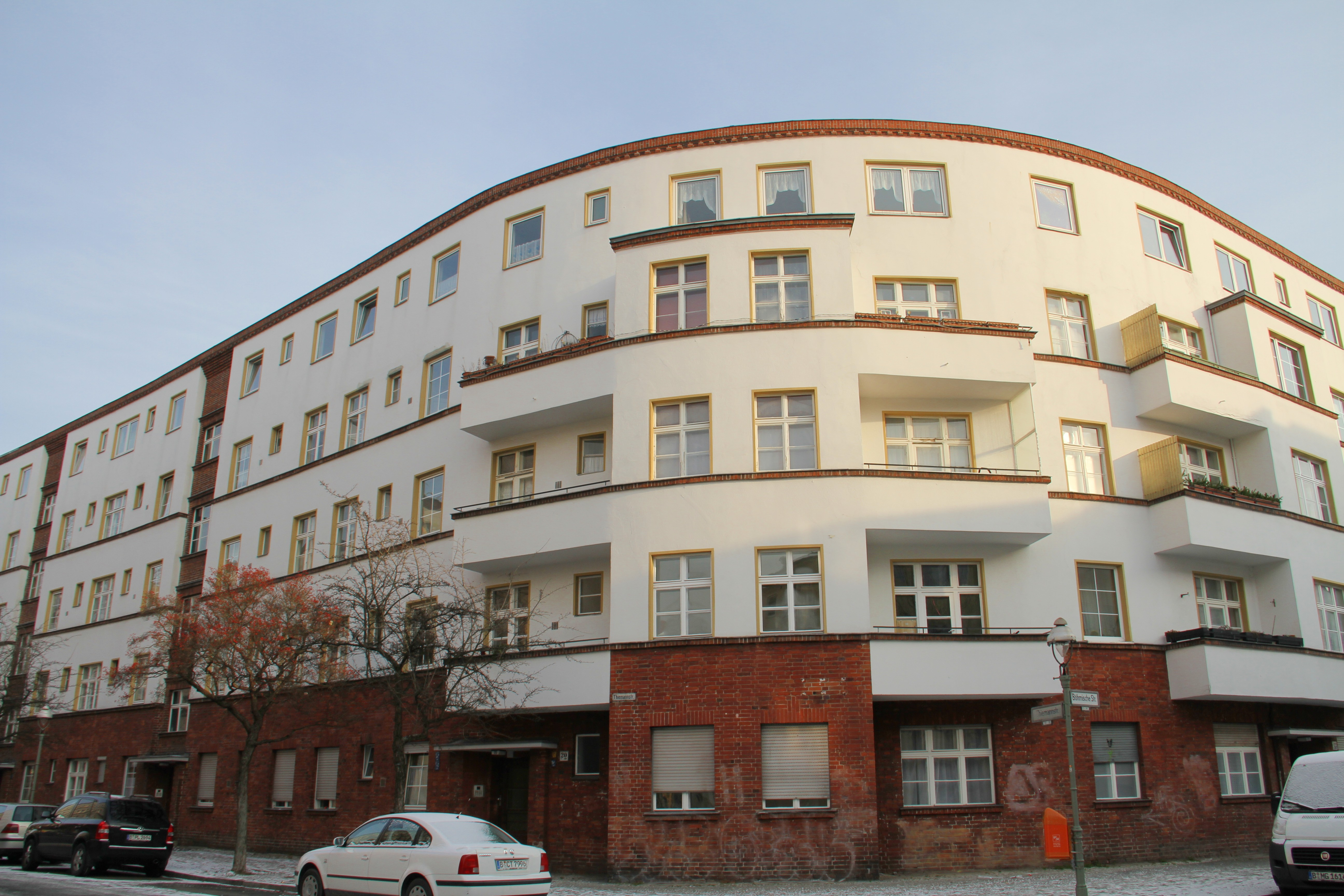 Böhmische Straße 21/23 Thiemannstraße 16–18A, 19–22A, 23